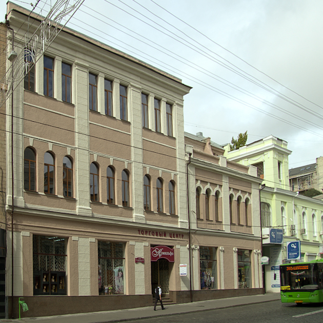 г. Харьков, ул. Сумская, 13